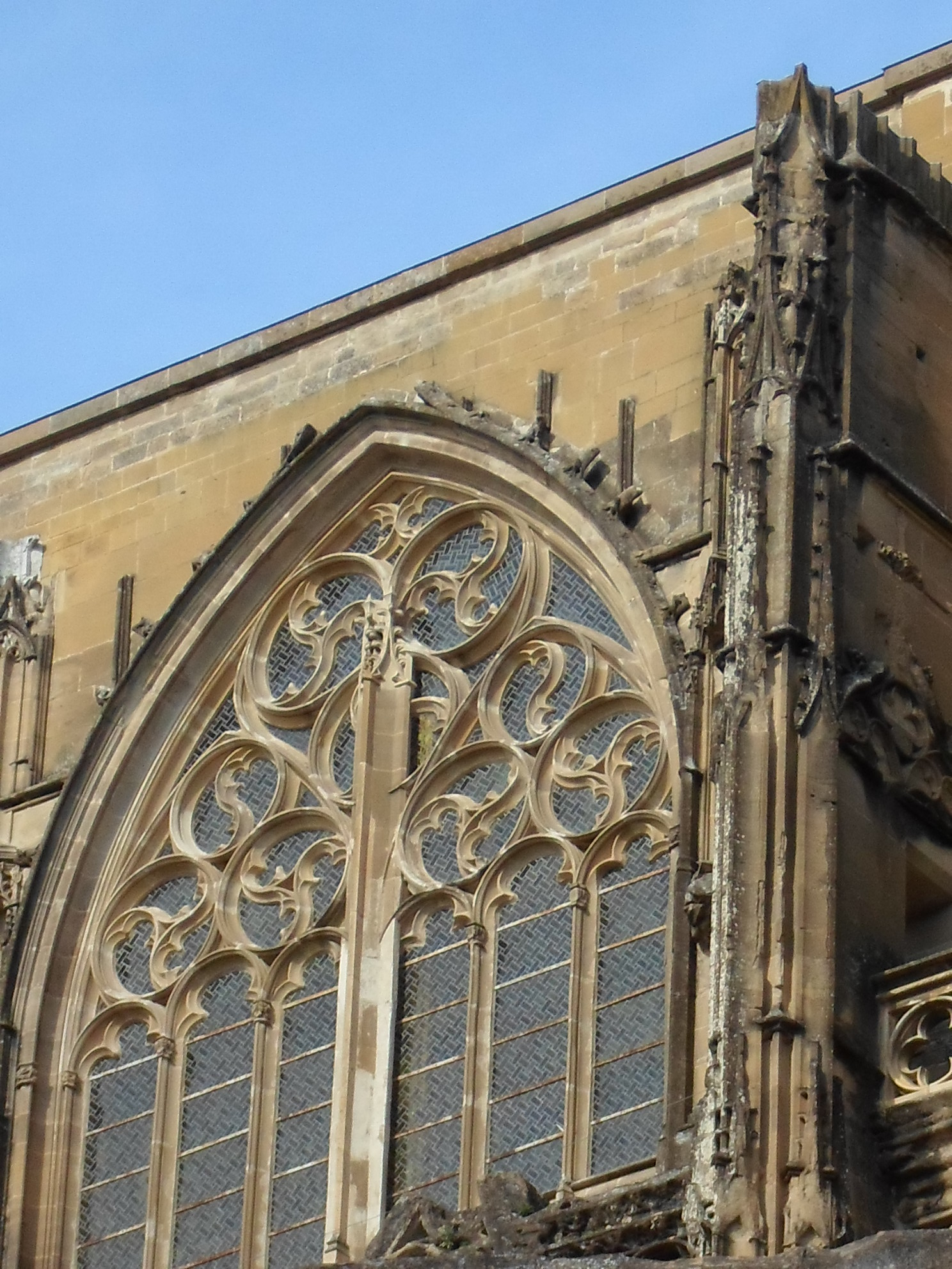 Ensemble de "Triskel" et "Biskel" - Saint Antoine l Abbaye - France (Triskelion - Triskeles)